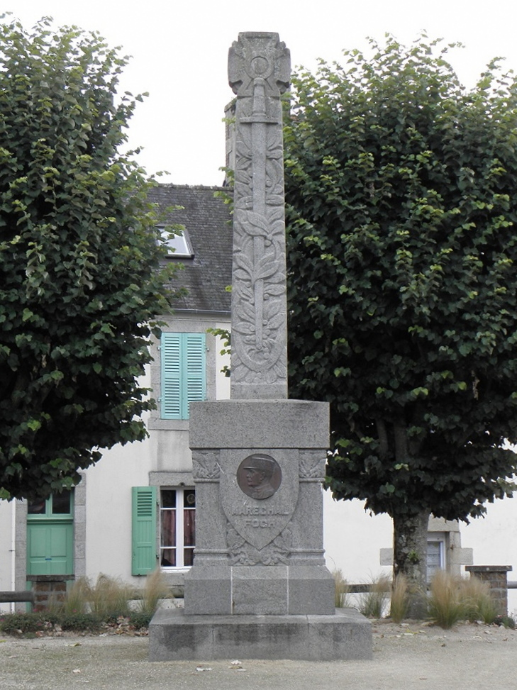 Monument commémoratif du Maréchal Foch à Plouejan, section de commune de Morlaix (35).